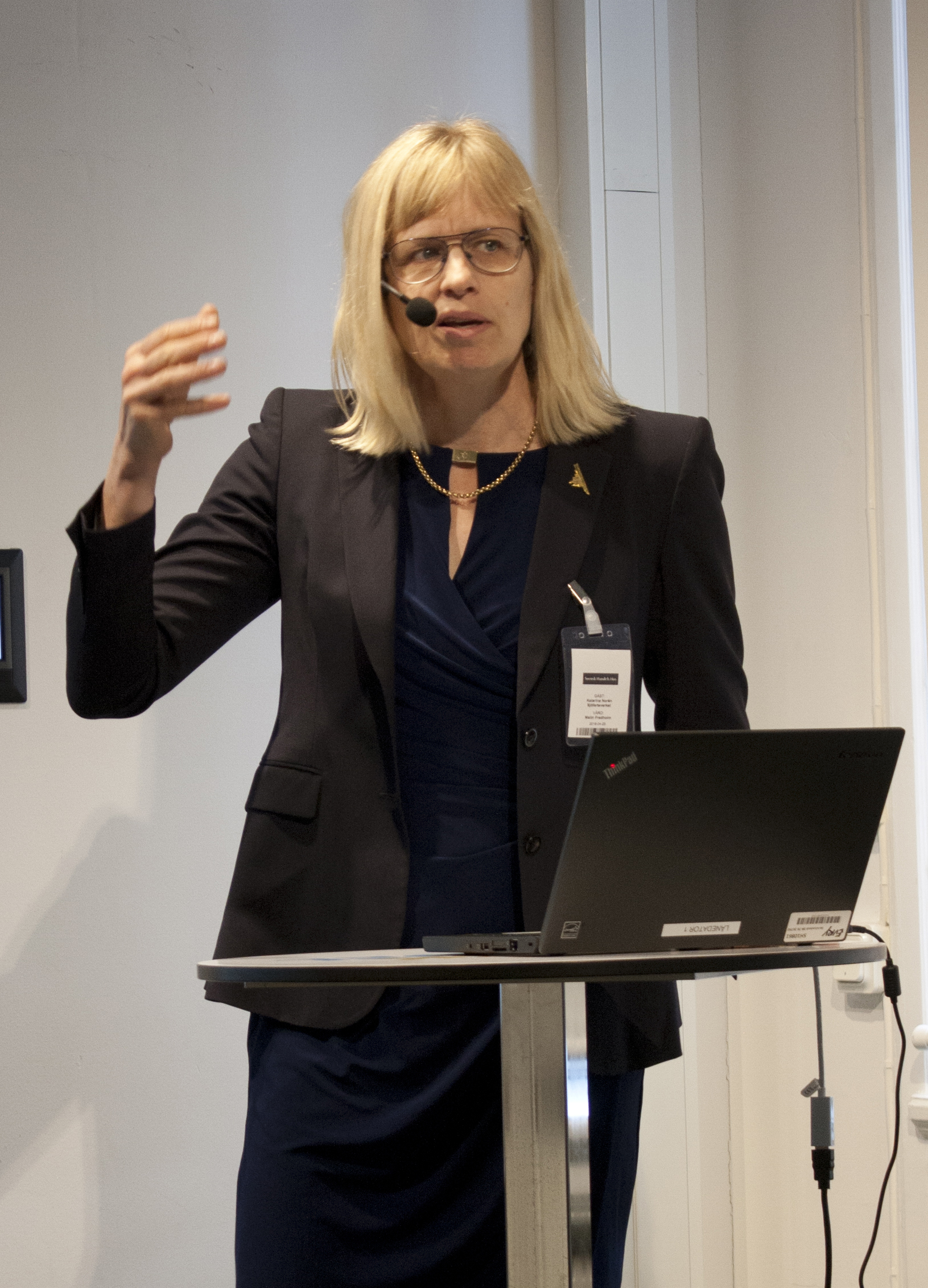 Katarina Norén håller ett föredrag vid årsstämman för Näringslivets transportråd, i Stockholm 2018.